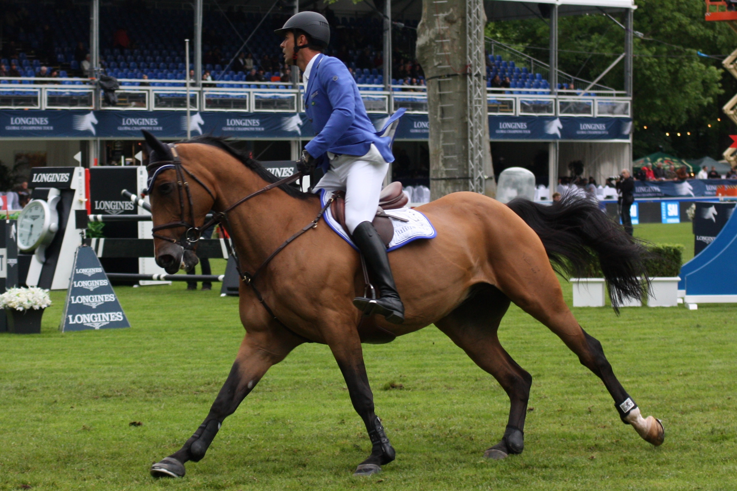 77. Internationanles Wiesbadener Pfingstunier 2013, CSI***** Eröffnungsspringen, Alvaro Alfonso de Neto Miranda auf AD Rahmannshofs Bogeno Personality rights warning Although this work is freely licensed or in the public domain, the person(s) shown may have rights that legally restrict certain re-uses unless those depicted consent to such uses. In these cases, a model release or other evidence of consent could protect you from infringement claims.